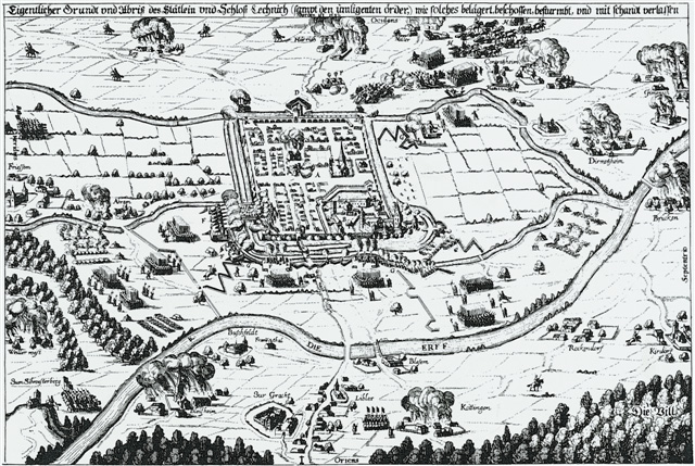 Ansicht der belagerten Stadt Lechenich und der Umgebung aus der Vogelschau auf einem zeitgenössischen Flugblatt von 1642. Kupferstich, vermutlich von Matthäus Merian d.Ä.